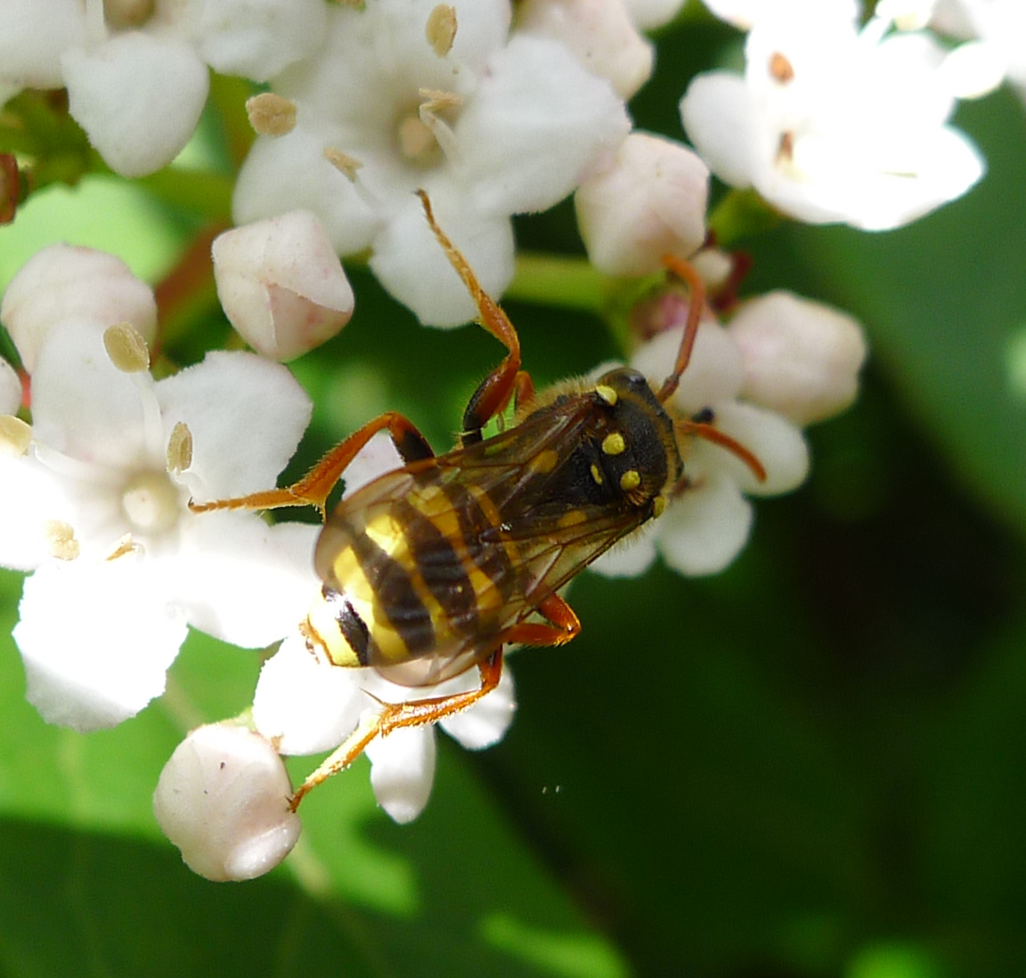 Nomada goodeniana. Female